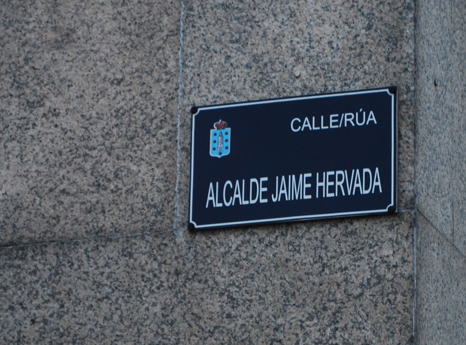 praca rúa alcalde jaime hervada a coruña, galiza